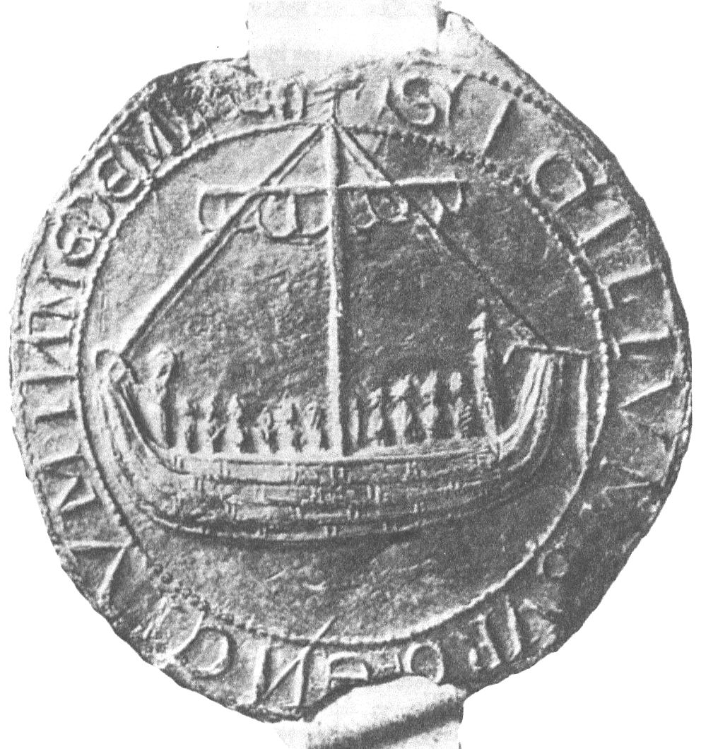 Zegel van Medemblik uit 1550